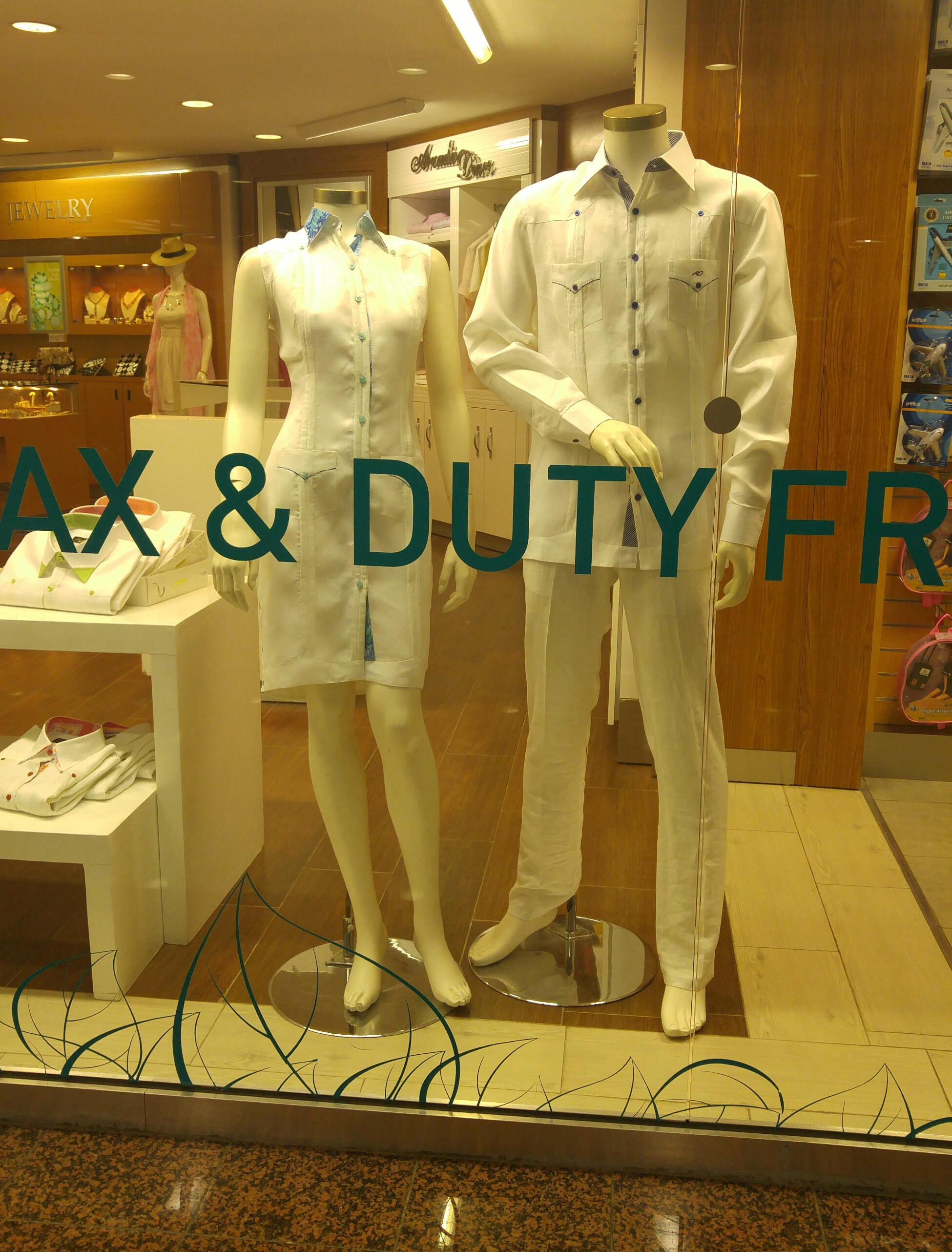 Chacabanas o Guayaberas en el Duty Free del Aeropuerto Internacional de las Américas en Santo Domingo, República Dominicana